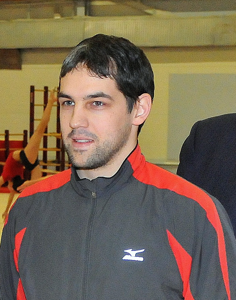 Igors Vihrovs